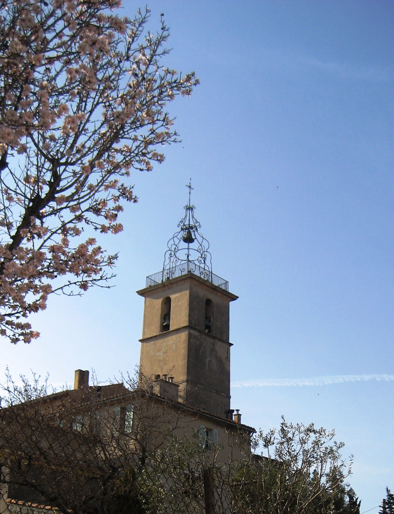 Exemple de clocher avec campanile en fer forgé et cloches installées dans les baies.